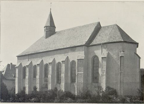 Die Kirche des Klosters Himmelpforte (Ense, Kreis Soest) um 1905